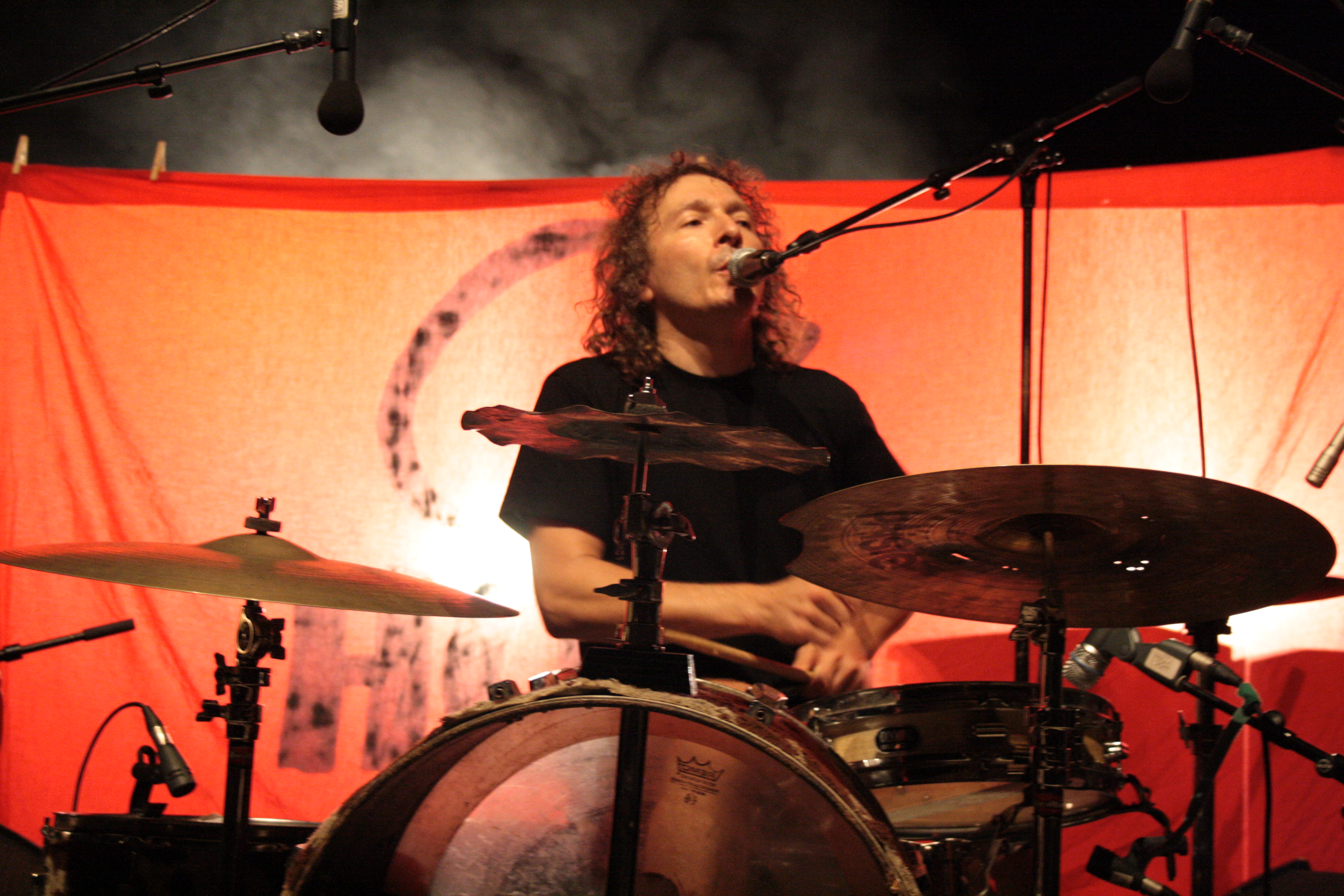 René Binamé en concert à Tournus en juin 2012 : Binam' à la batterie et au chant.